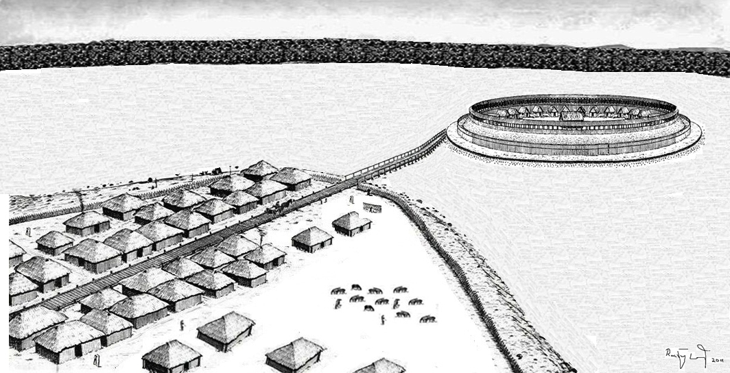 Burgwall Groß Raden um 980; Rekonstruktionsversuch